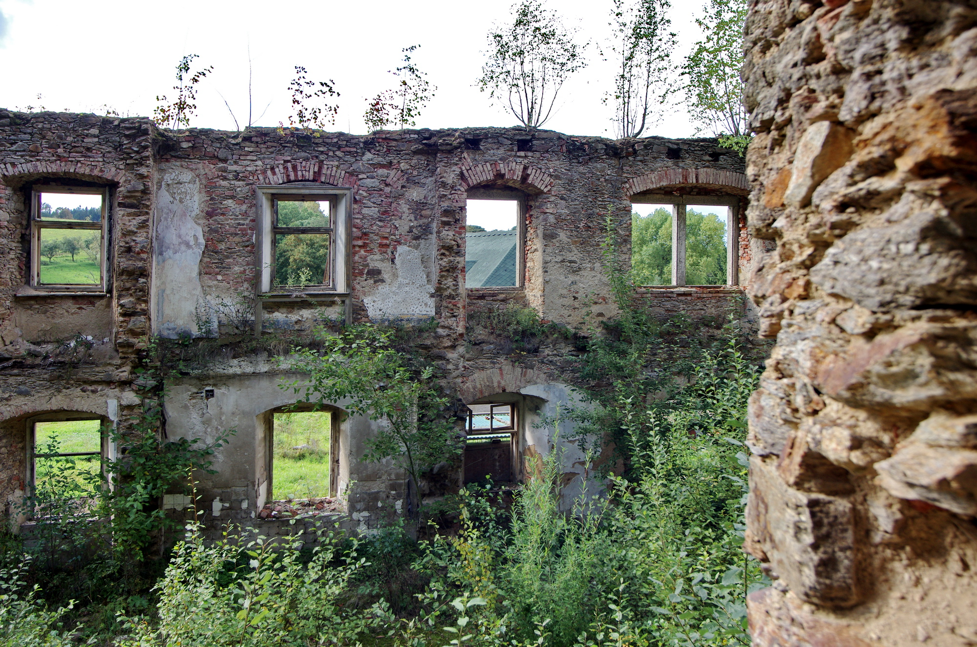 Ruina zámku v Kostelní Bříze, okres Sokolov